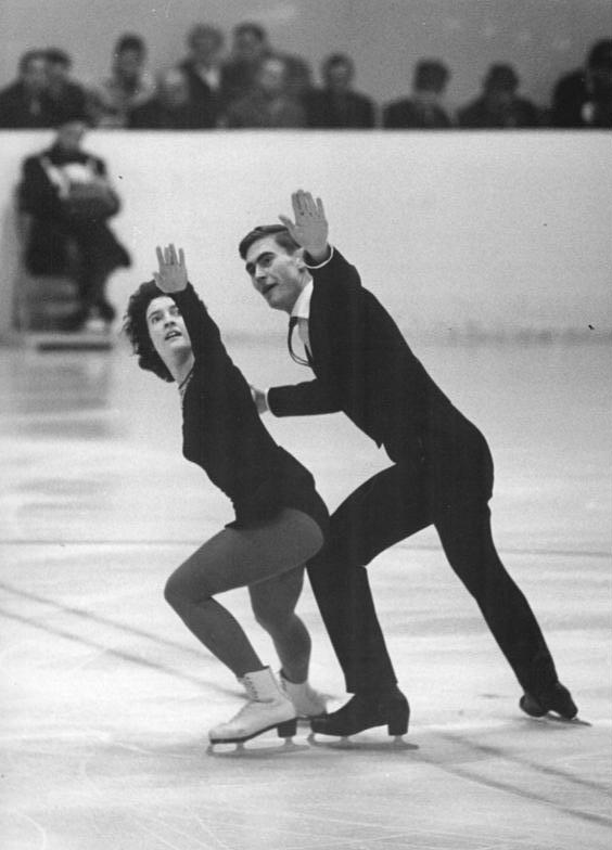 Irene Müller, Hans-Georg Dellner Zentralbild 13.12.1963 Eiskunstlauf, Olympia-Ausscheidungen Ausgezeichnete Leistungen gab es bei den Ausscheidungskämpfen der Eiskunstläufer der DDR und Westdeutschlands am 12.12.1963 in der Berliner Werner-Seelenbinder-Halle vor 4500 Zuschauern. Nach der Pflicht am Vormittag wurde am Abend der erste Durchgang der Olympia-Ausscheidungen um die freien vier Plätze für Innsbruck mit dem Kürprogramm beendet. Die Würfel fallen dann endgültig am 19.12.1963 im Westberliner Sportpalast. UBz: Irene Müller-Hans-Georg Dellner (DDR) liefen sehr sicher und harmonisch. Mit einer 5,6 sowohl in der A- als auch in der B-Note erhielten sie die höchste Wertung. mit Platzziffer 8 und 10,58 Punkten haben sie noch beim zweiten Durchgang die große Chance den ersten Platz zu erreichen. -Kohls